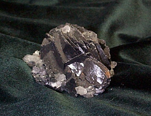 Dark-calcite. Fekete kalcit.